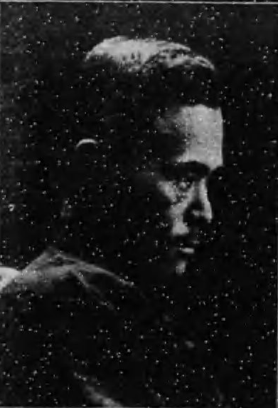 横山運平、1923年の写真